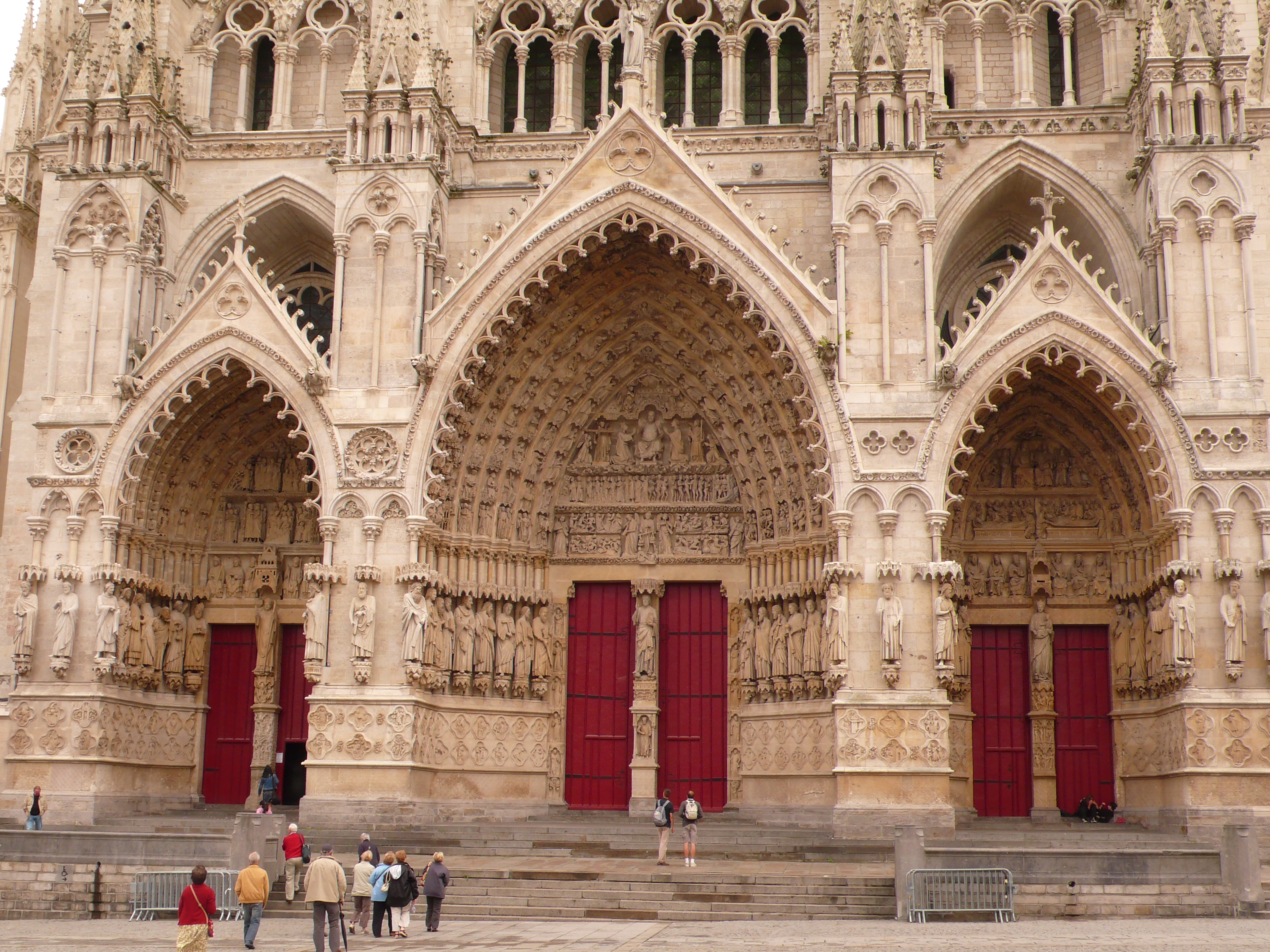 Kathedrale von Amiens, Frankreich, Westfassade, Portalzone